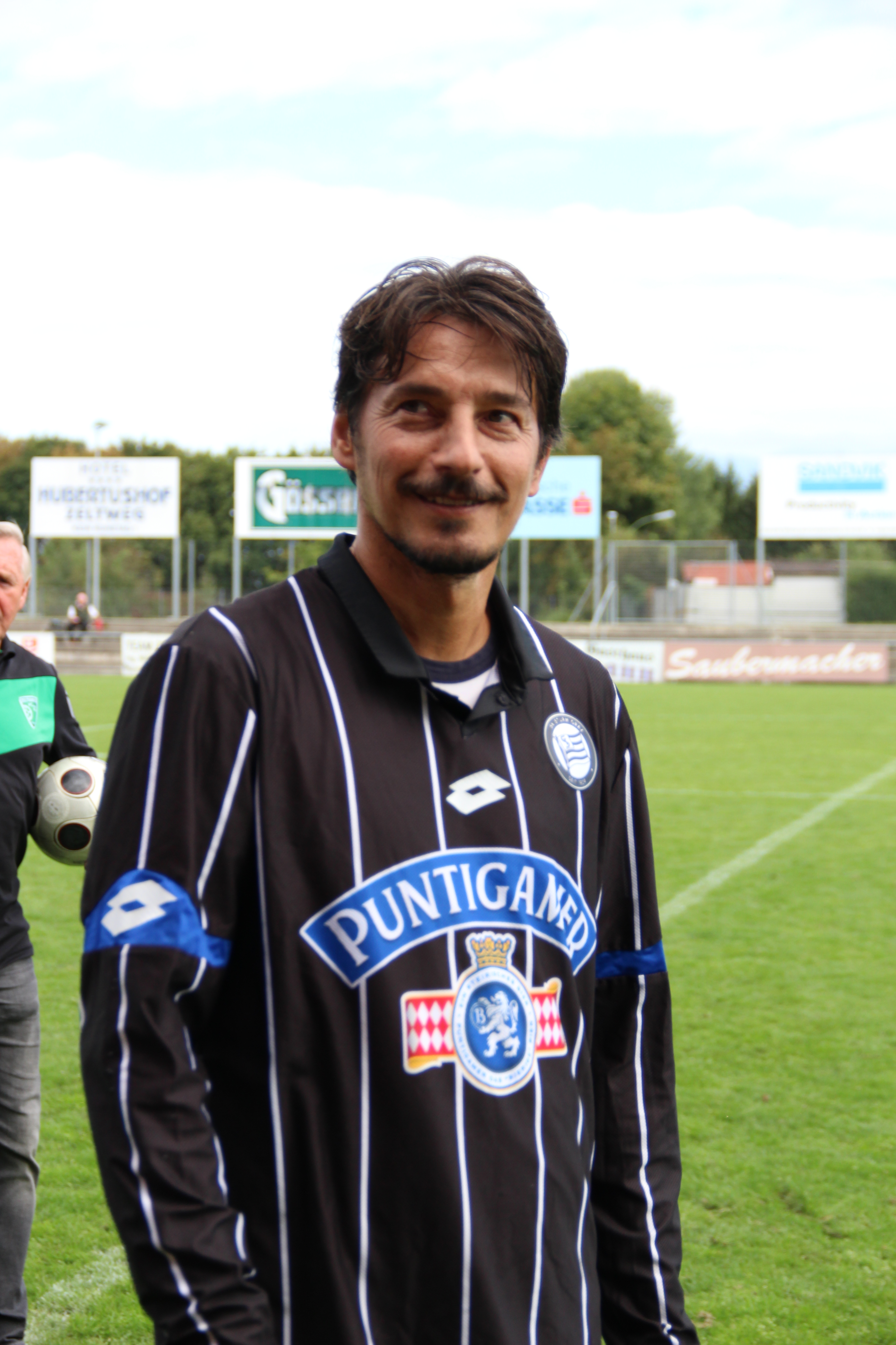 Zeltweger Legendenturnier 2018